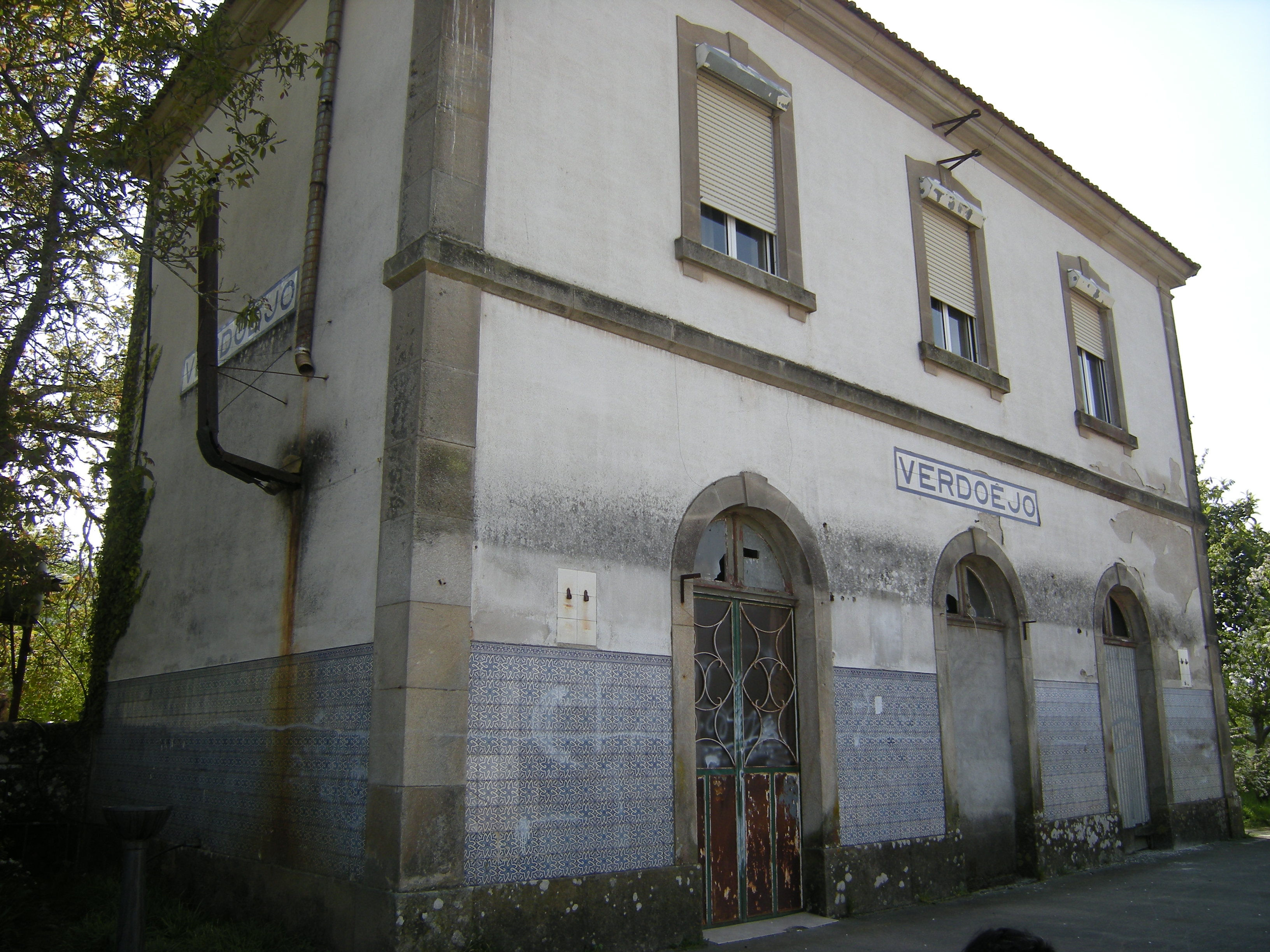 Antigua estación de Verdoejo.